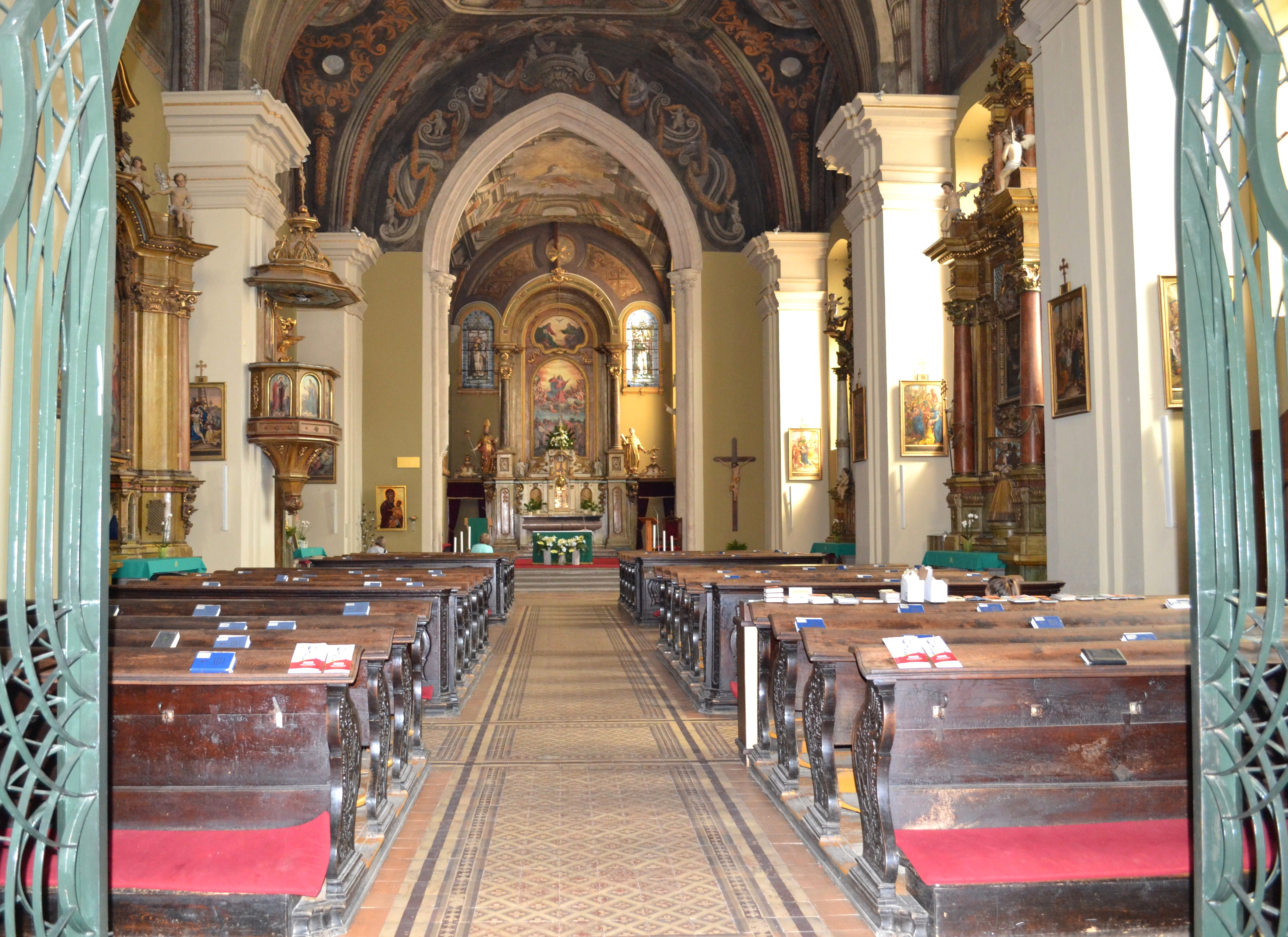 Maľby v kostole Nanebovzatia Panny Márie od košického maliara Štefana Vöröša pochádzajú z roku 1756. Kostol Nanebovzatia Panny Márie je najstaršou sakrálnou stavbou v Košiciach (koniec 13. stor.) Veľký požiar ho však v roku 1556 natoľko poškodil, že až do roku 1698 sa v ňom bohoslužby nekonali. V prvej polovici 18. storočia ho opravili a jeho vnútro čiastočne prestavali v barokovom slohu.